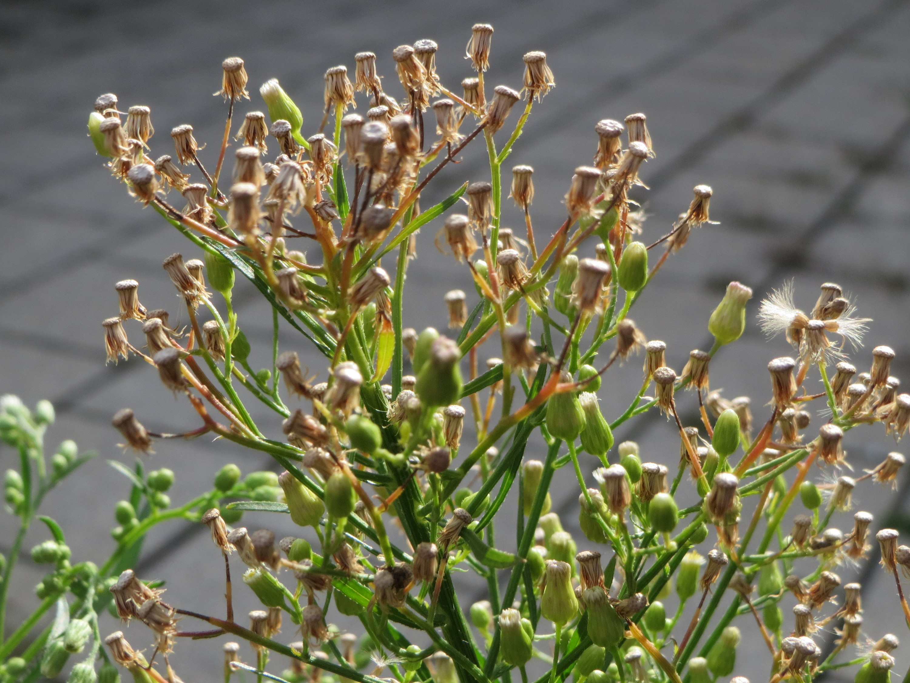 Kanadische Berufkraut (Erigeron canadensis) am Bahnhof Schwetzingen